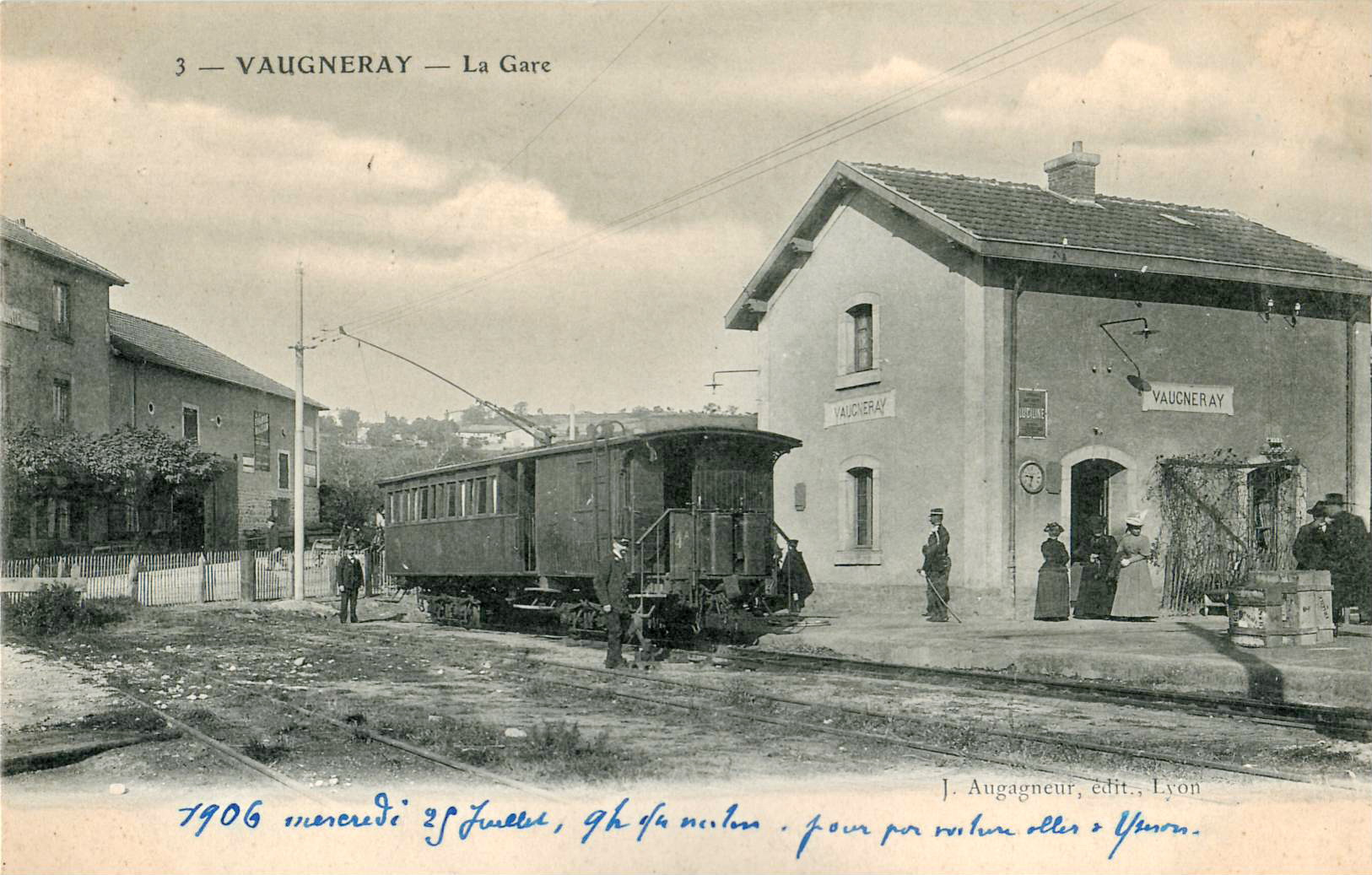 Carte postale ancienne éditée par J. Augagneur à Lyon : VAUGNERAY - La Gare Il s'agit d'une rame du Train de Vaugneray exploitée par le Fourvière Ouest-Lyonnais (FOL